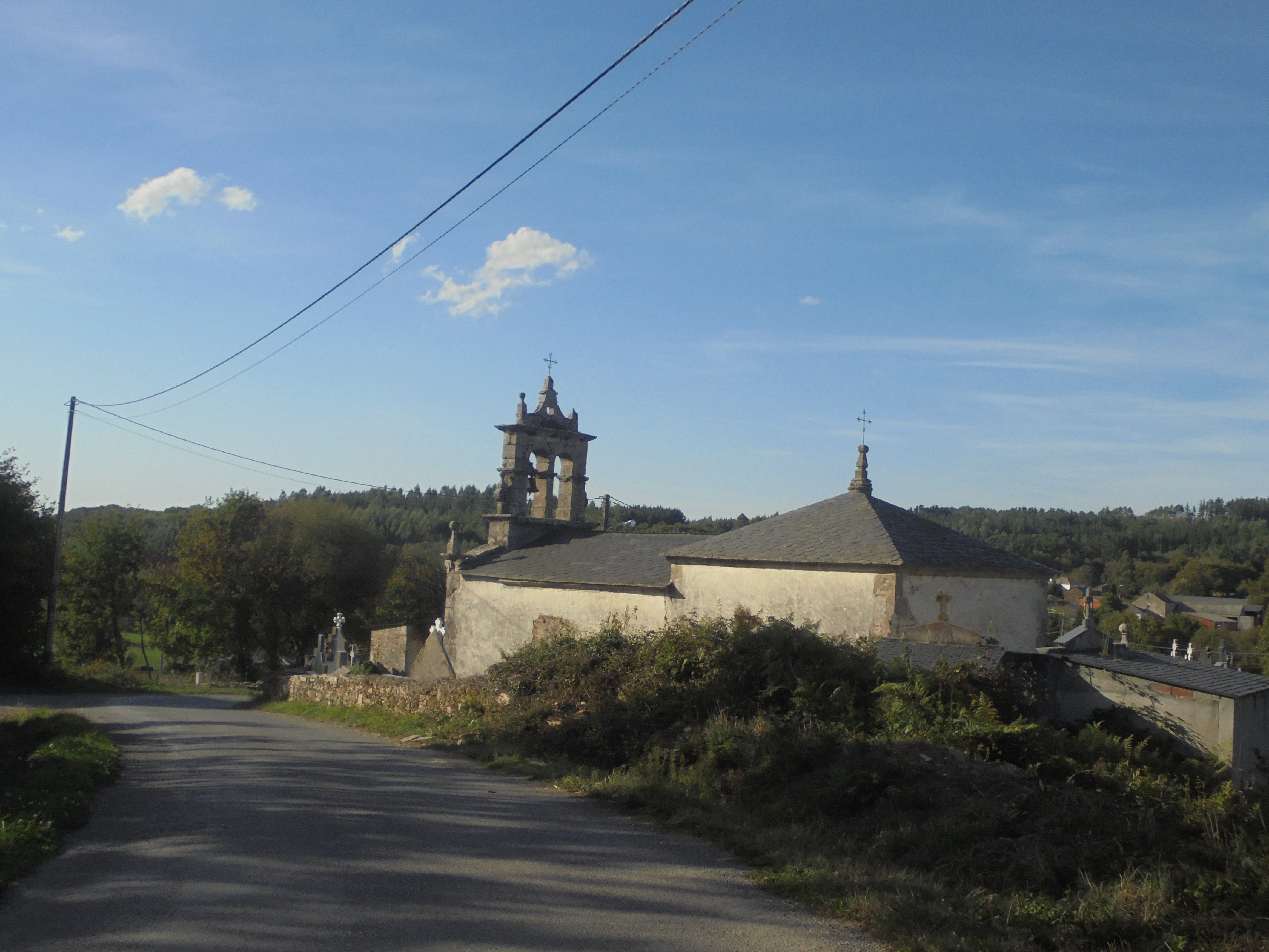 Igrexa parroquial de Fraialde ( Pol)